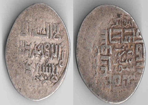 روی سکه : لا الله الا الله وحد لا شریک له و در حاشیه ، سال ضرب 750 هجری قمری پشت سکه : محمد رسول الله ؛ در وسط ضرب شوشتر ، و حاشیه : ابوبکر ، عمر ، عثمان، علی .سکه ایلخانی